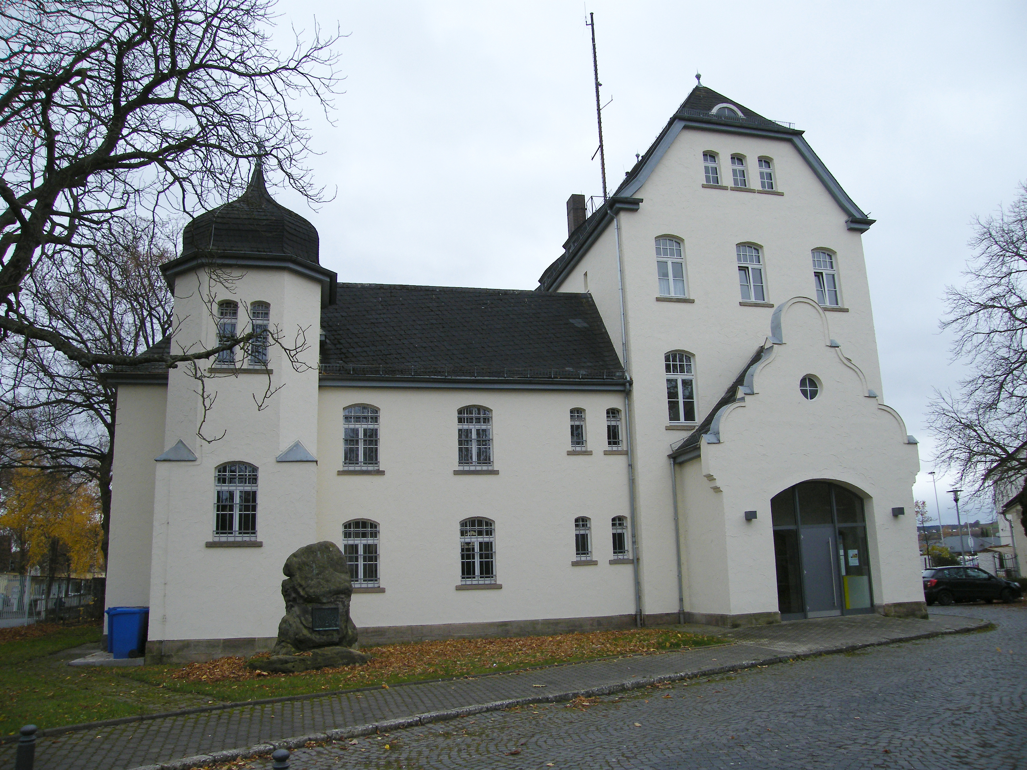 Gedenkstein zur Erinnerung an das Bataillon Waldeck (1681-1931) Standort ehem. belgischen Kaserne Bad Arolsen